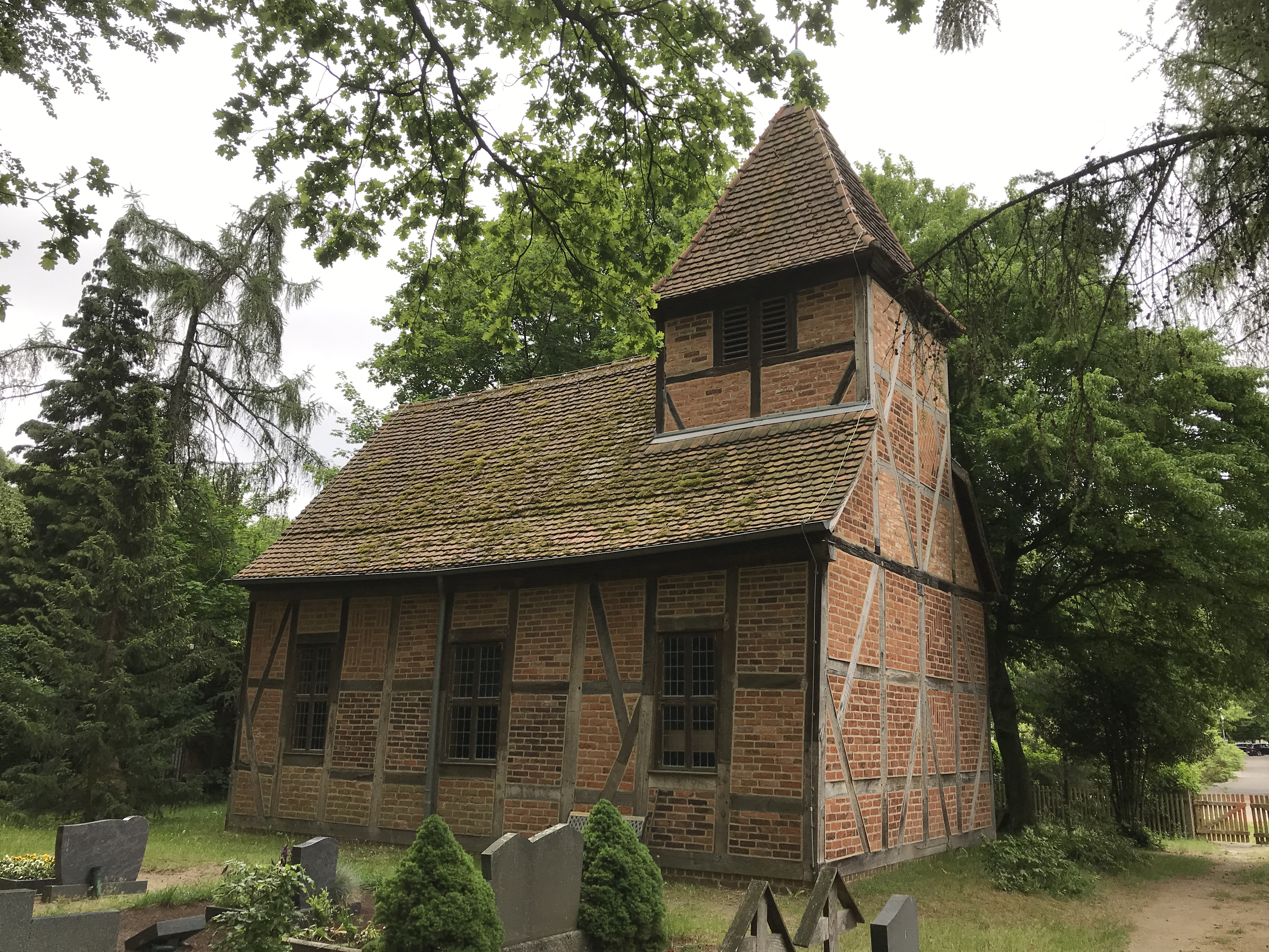 Die Dorfkirche Dahlen ist eine Fachwerkkirche aus der zweiten Hälfte des 17. Jahrhunderts in Dahlen, einem Ortsteil der Gemeinde Gräben im Landkreis Potsdam-Mittelmark. Im Innern hängt unter anderem ein Taufengel.